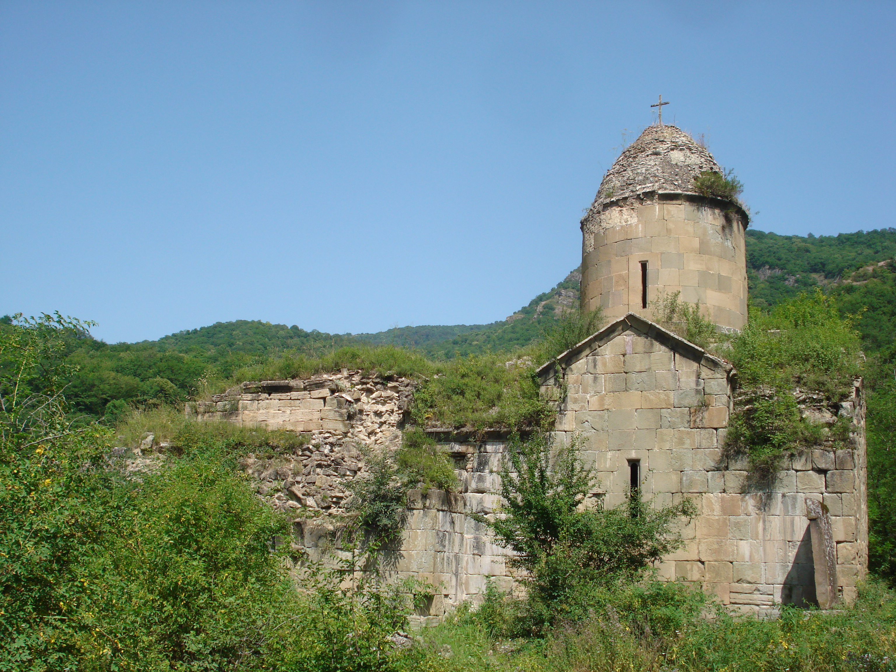 ՀՀ պատմամշակութային արգելոց-թանգարանների և պատմական միջավայրի պահպանության ծառայություն ՊՈԱԿ - Առաքելոց վանական համալիր - 8/6.12